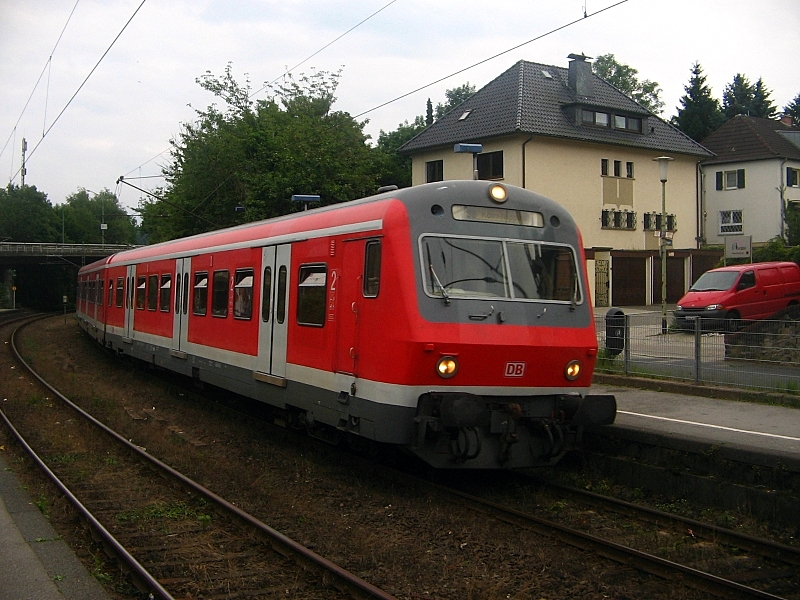 Einfahrende S-Bahn in Essen-Werden.